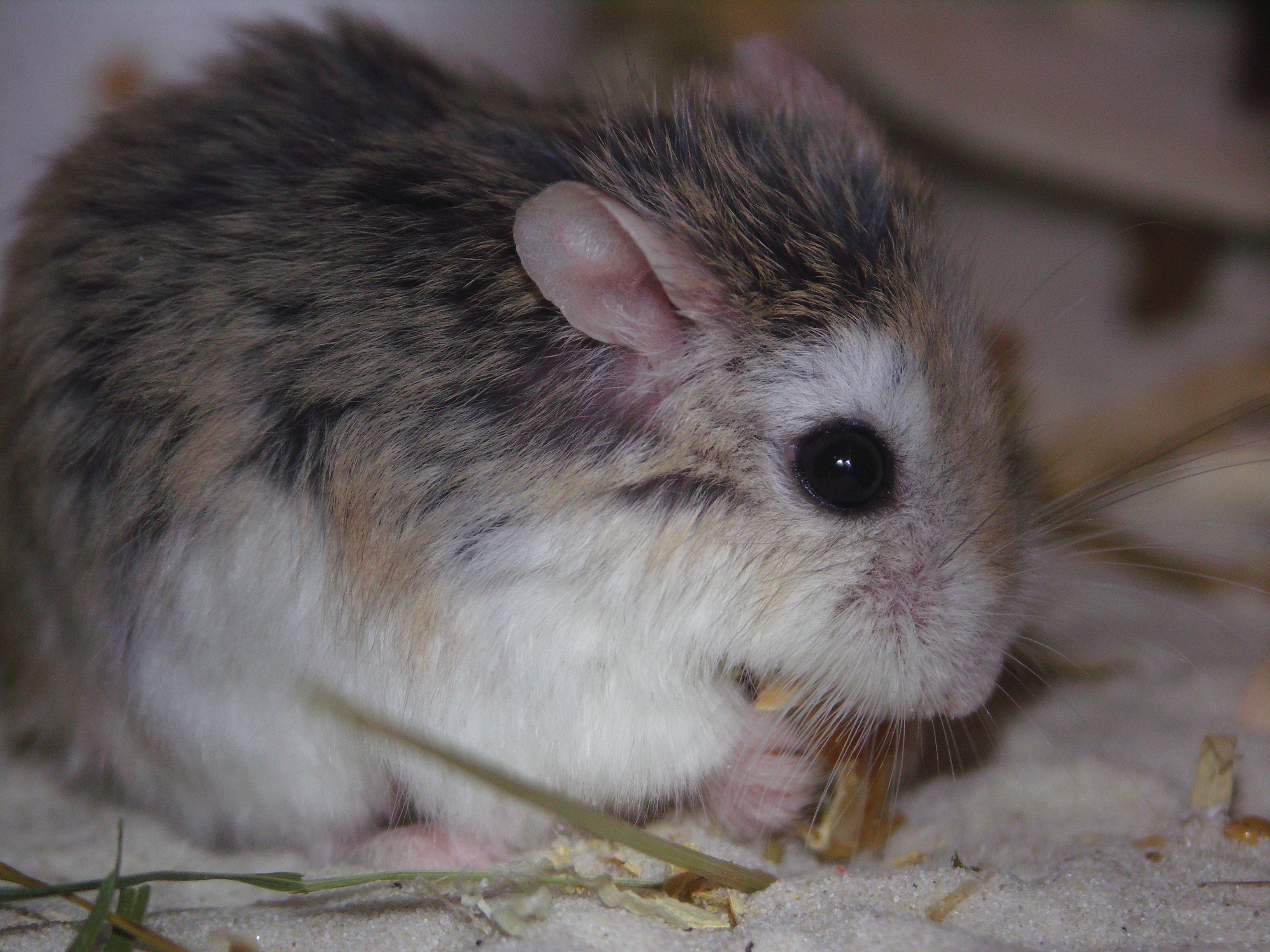 Phodopus roborovskii, male, 22 months old